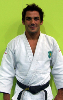 Foto tirada nos Campeonatos de Equipas Seniores Autor Afonso Ramos (aramos)em kimono